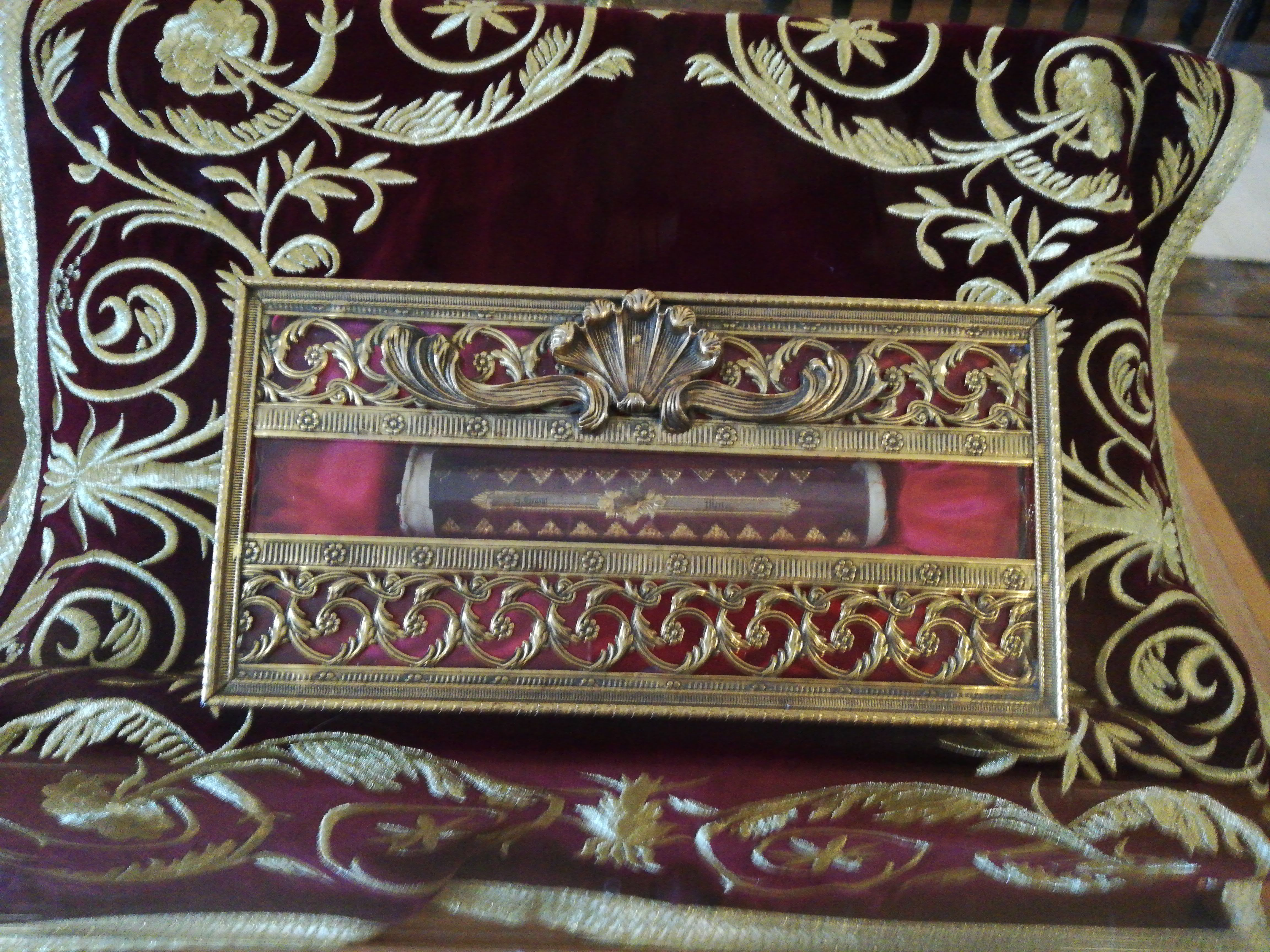 Igreja Matriz de São Jorge - igreja em Santana, Madeira, Portugal Cultural property Igreja Matriz de São Jorge, São Jorge, Santana, Madeira, Portugal Q66816102, SIPA ID: 8330 Wiki Loves Monuments ID: DRC-M-221004012